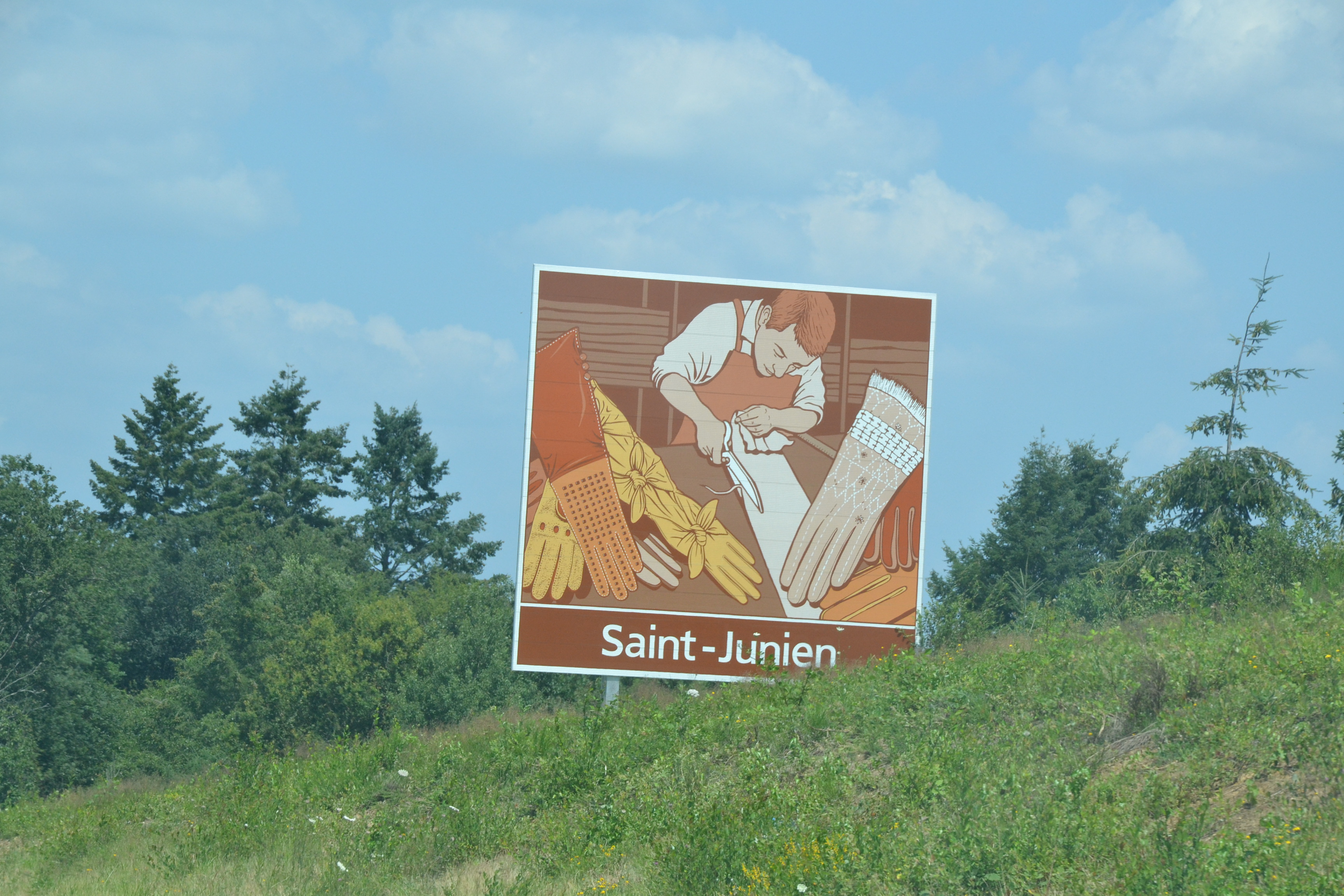 Panneau touristique relatif à la tradition gantière de Saint-Junien (Haute-Vienne, France), au bord de la route nationale 141, près d'Etagnac (Charente, France).